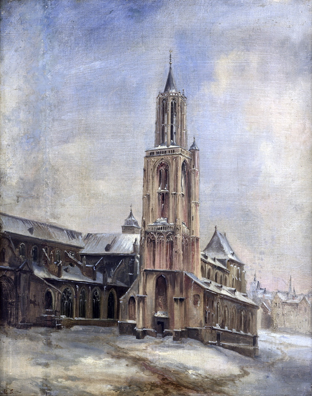 Olieverfschilderij door Alexander Schaepkens van de Sint-Janskerk in Maastricht. Formaat: 68 x 54,1 cm (excl. lijst); 80 x 66 cm (incl. lijst). Collectie Bonnefantenmuseum Maastricht, objectnummer 1000975 (bruikleen 1922).